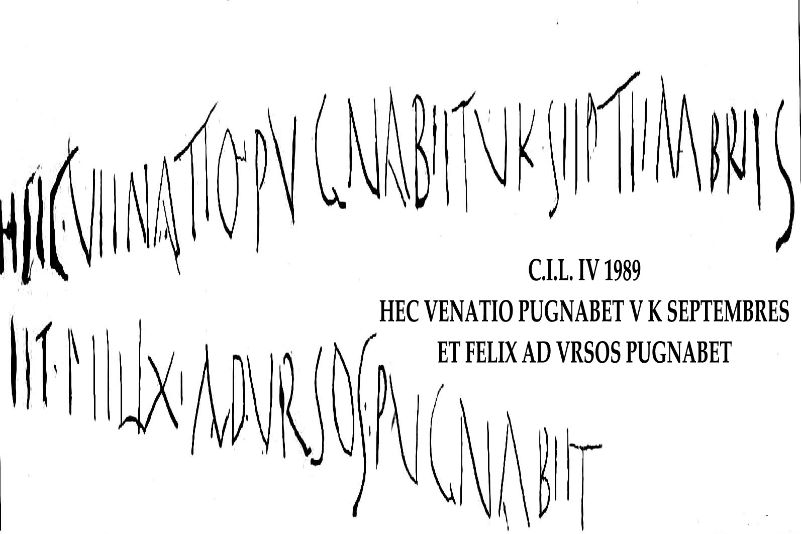 Inscripción pompeyana